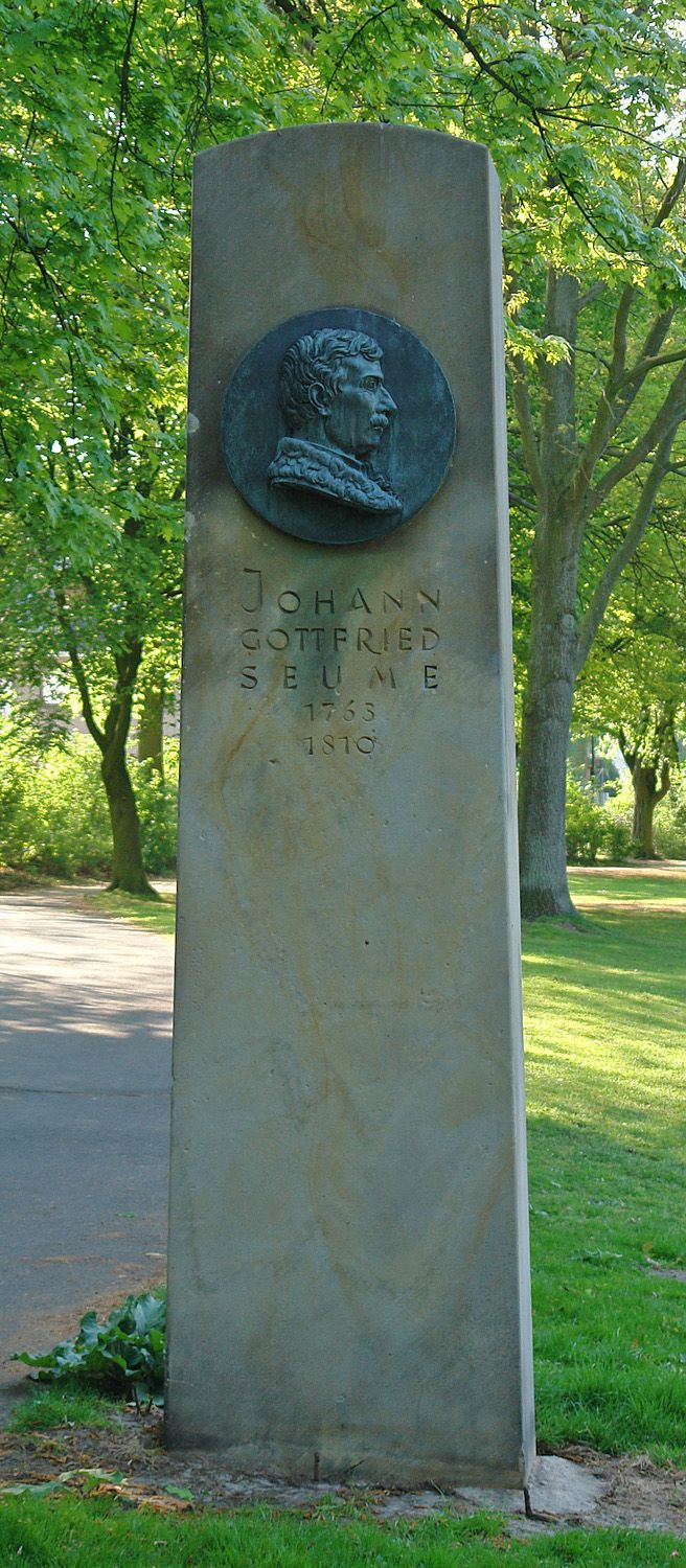 Denkmal Johann Gottfried Seume (1763-1810). Standort: Am Werderufer nahe Wilhelm-Kaisen-Brücke. Inschrift Rückseite: 1783 WURDE DER DICHTER AUF SEINER FLUCHT VON BREMER BÜRGERN GERETTET k: kunst im öffentlichen raum bremen